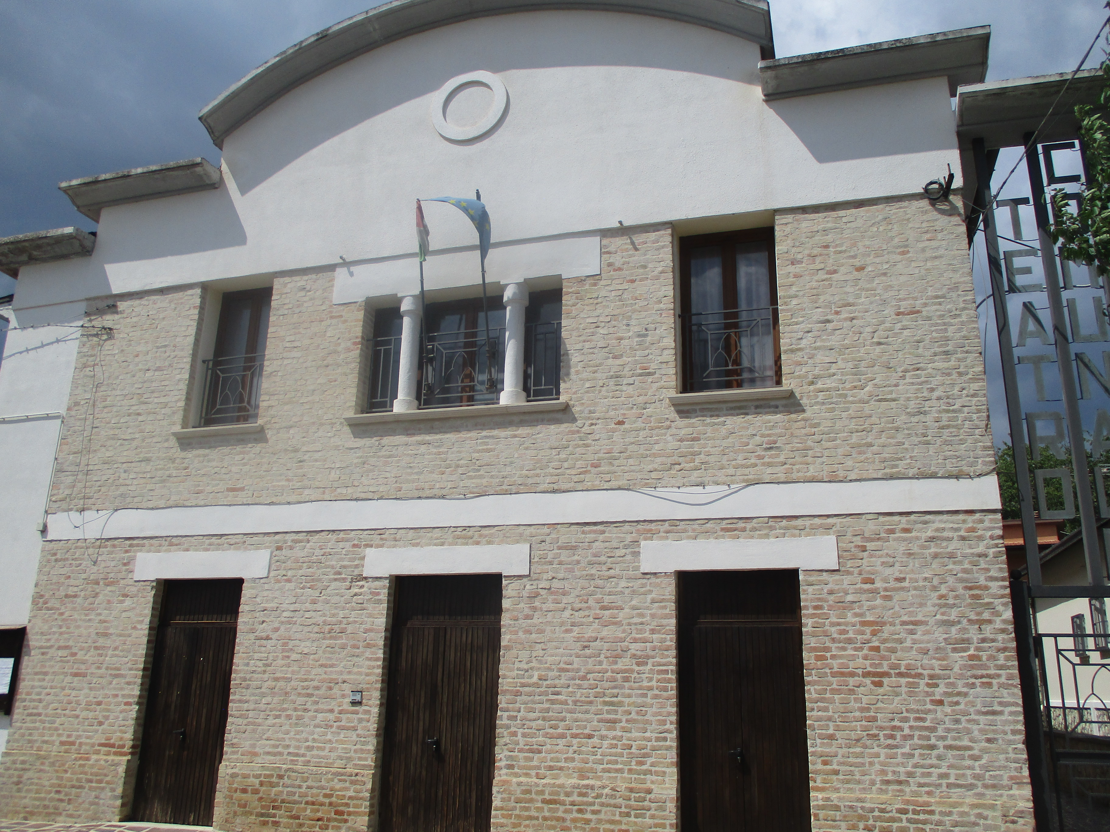 Teatro Nicola Calipari